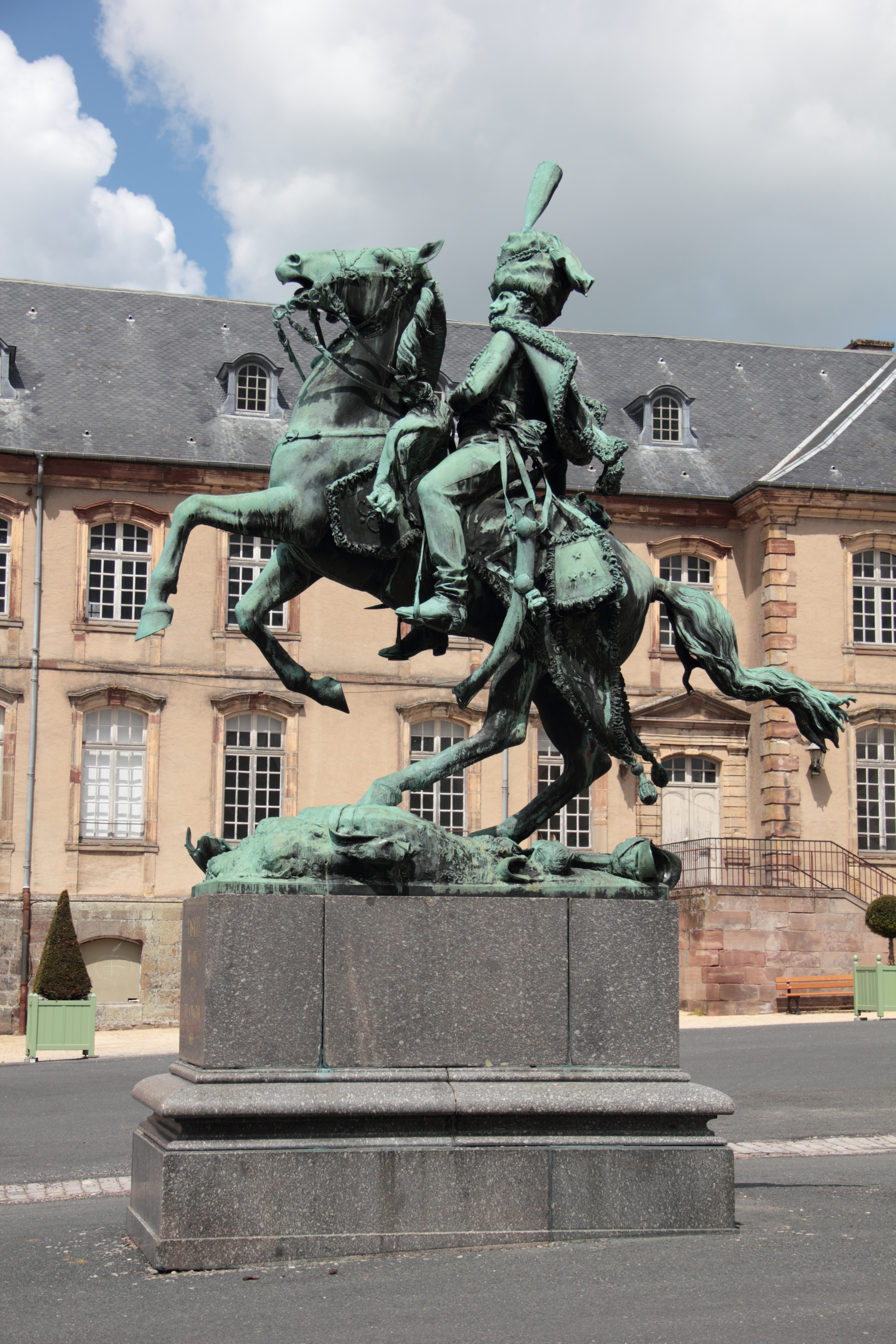 Sculpture équestre d'Antoine Charles Louis de Lasalle, cours des communs, Château de Lunéville